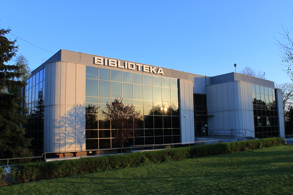 Budynek Miejskiej i Powiatowej Biblioteki Publicznej w Będzinie